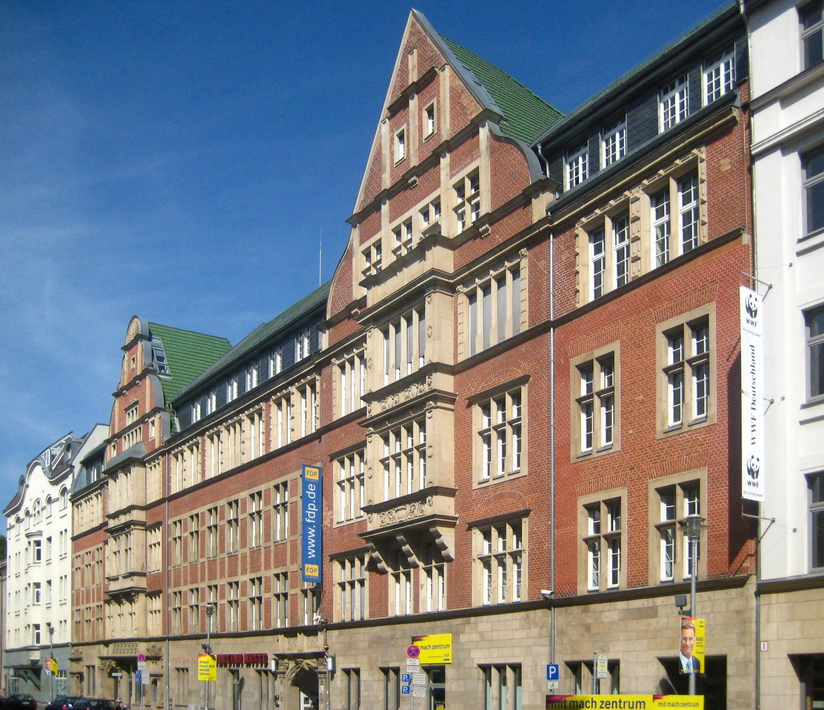 Das Hans-Dietrich-Genscher-Haus (bis 2017: Thomas-Dehler-Haus) in der Reinhardstraße 14/16 in Berlin-Mitte, Sitz der Bundesgeschäftsstelle der FDP. Das Gebäude wurde 1908-1912 für den Dominikanerorden als Neubau des St. Maria-Victoria-Krankenhauses mit angeschlossenem Altenheim errichtet. Eine Spende des vermögenden Ordensunterstützers Carl Fürst zu Löwenstein-Wertheim-Rosenberg erlaubte die Errichtung eines stattlichen Krankenhausbaus in den Formen der deutschen Renaissance anstelle der einfachen Krankenstation, die Dominikanerinnen hier seit den 1880er-Jahren zur Armenversorgung leiteten. Architekt war Casper Clemens Pickel. Zwei übergiebelte Risalite mit Erkern dominieren die langgestreckte Klinker- und Sandsteinfassade. Zwei Relieftafeln über dem Portal erinnern an die Seeschlacht bei Lepanto, in der eine Flotte christlicher Mächte 1571 die türkische Flotte besiegte und damit in der Darstellung der älteren Geschichtsschreibung "das Abendland rettete". Schutzpatronin des Sieges war die "Heilige Maria vom Siege" ("Maria Viktoria"), nach der das Krankenhaus benannt ist. Es wurde bis 1938 betrieben, danach wurde der Komplex von Gliederungen des "Reichsnährstandes" genutzt. Bei der Umfunktionalisierung wurde eine hofseitige Kapelle abgerissen. In der DDR-Zeit war das Gebäude Sitz des Deutschen Bauernverlages der Deutschen Bauernpartei (DBD) und des Deutschen Landwirtschaftsverlages. Seit der Sanierung 1998/1999 nutzt die FDP den Komplex als Parteizentrale. Er ist als Baudenkmal gelistet.